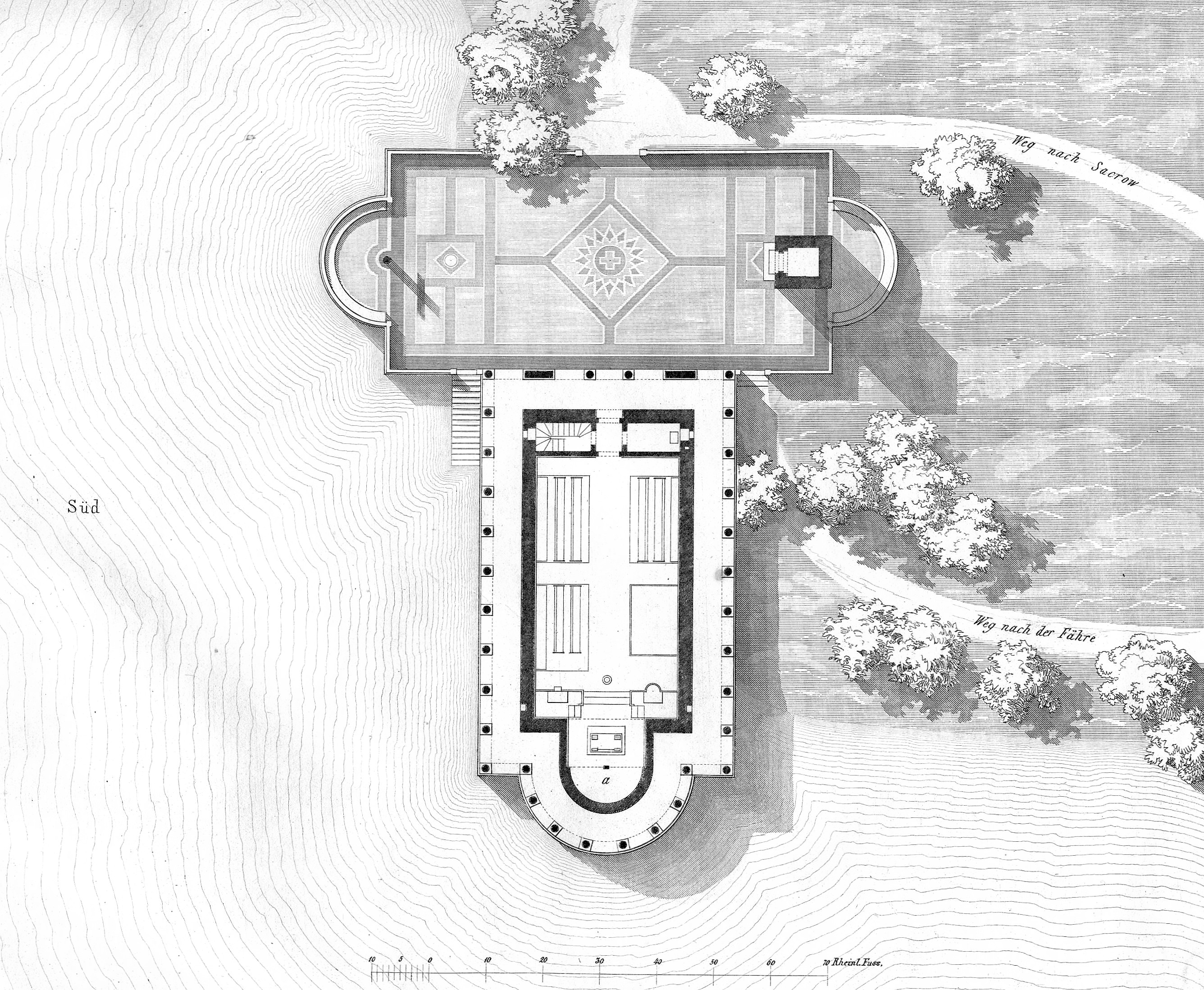 Grundriss der Kirche von Sacrow bei Potsdam